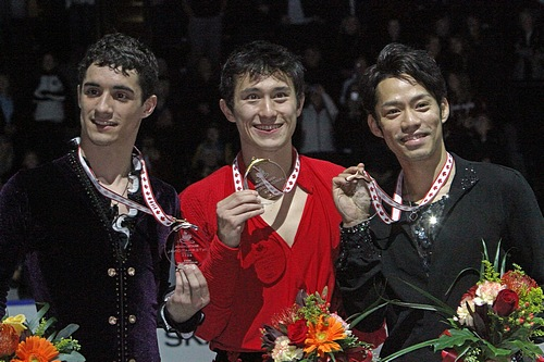 Подиум в мужском одиночном катании 2011 Skate Canada International. Слева на право: Хавьер Фернандес, Патрик Чан, Дайсукэ Такахаси.